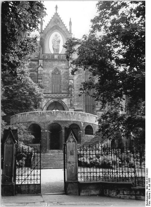 Erfurt, Dom Zentralbild TBD-Köhne-Koch 3030-4.7.1955 2 Motive- Der Dom zu Erfurt. Der Erfurter Dom mit dem Marienbild. Ansicht von der Mainzerhofstraße aus.